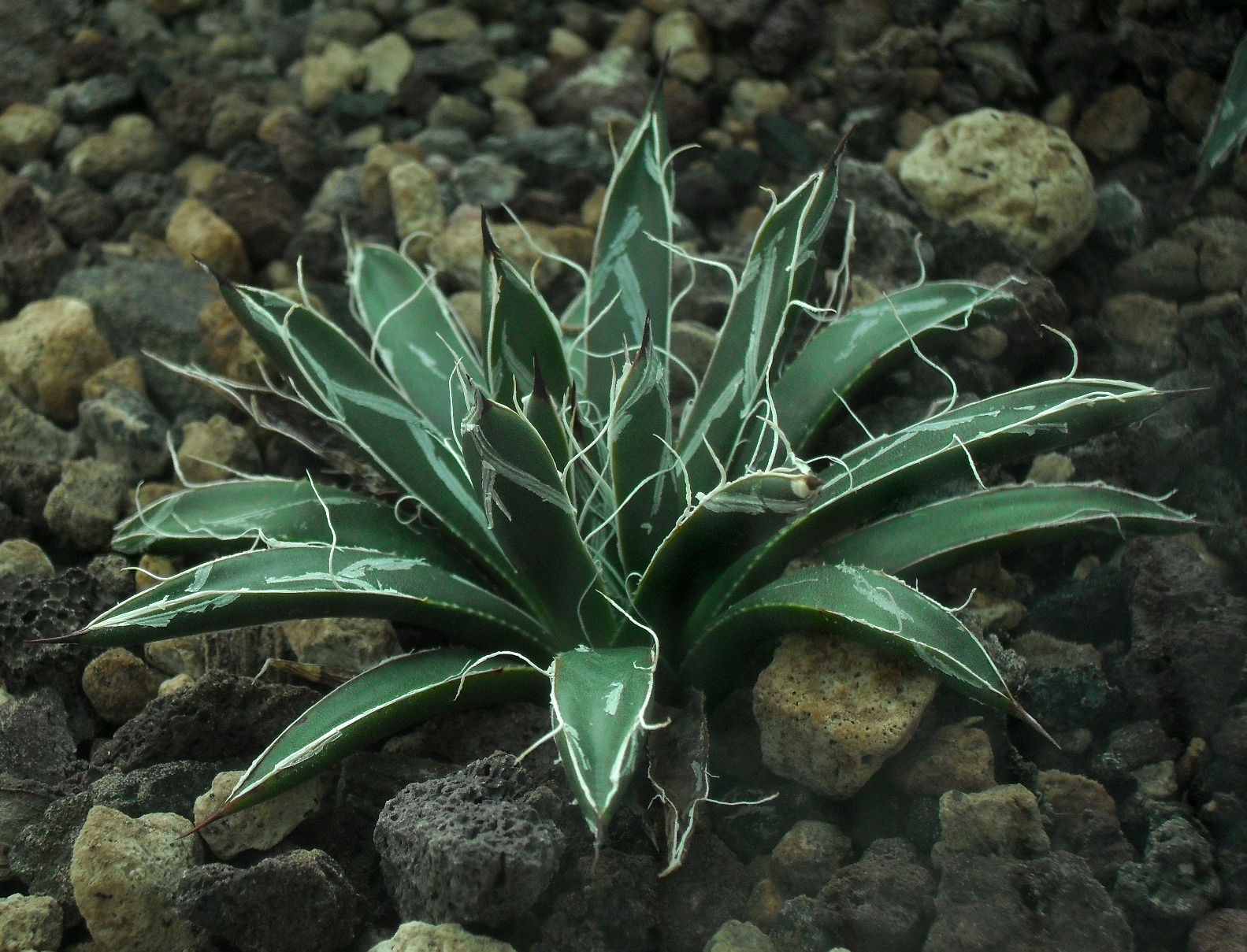 Agave toumeyana var. bella - Botanischer Garten Leipzig